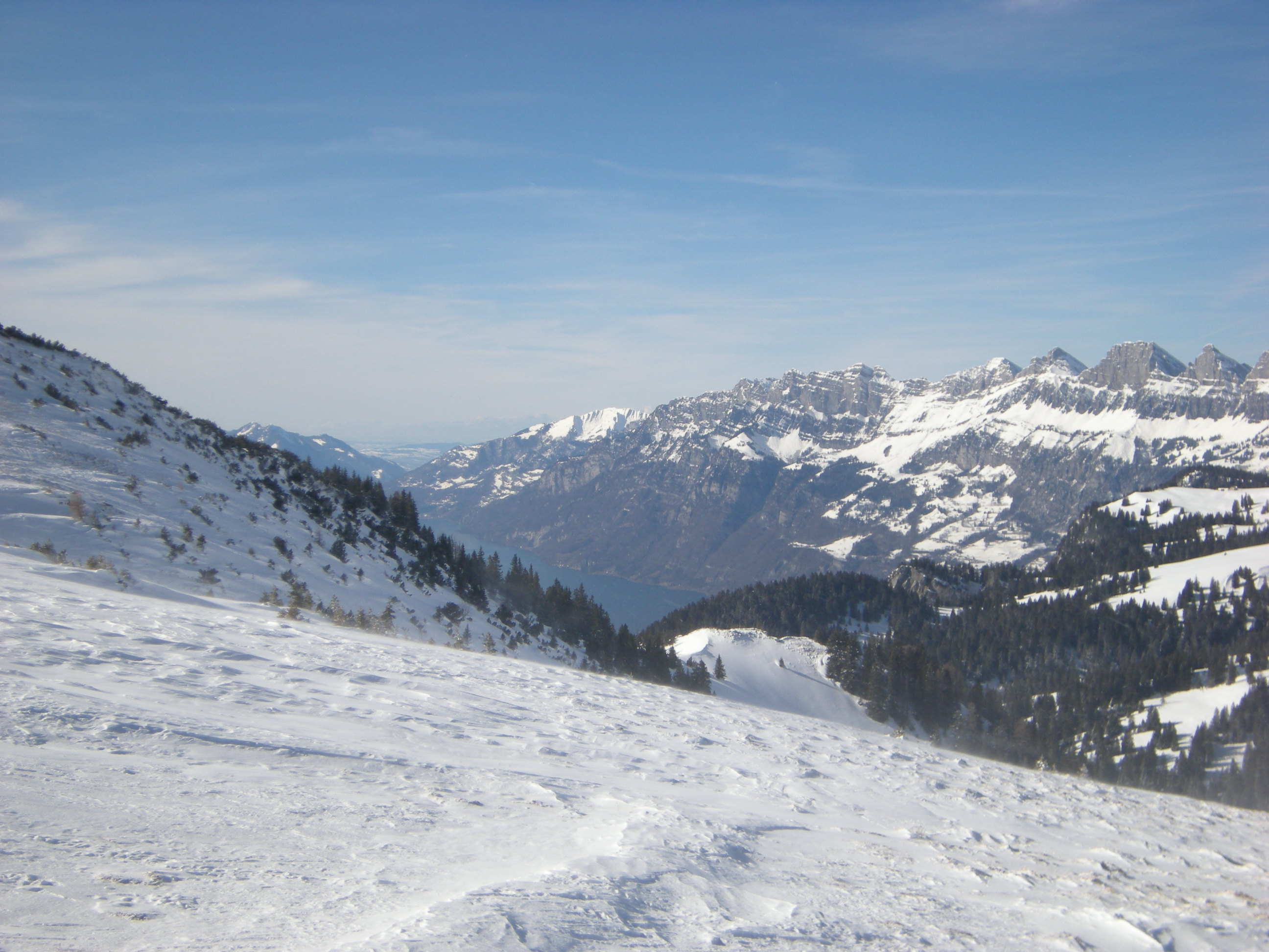 Walensee